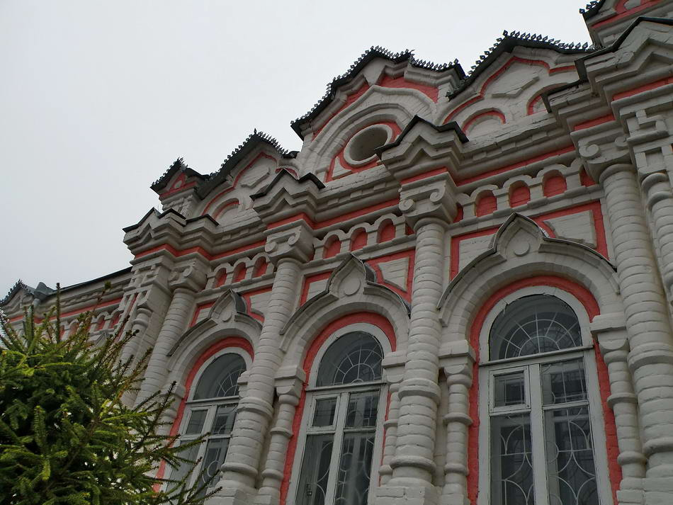 Белгородское Белогорье 2010. Краеведческий музей в городе Алексеевка.